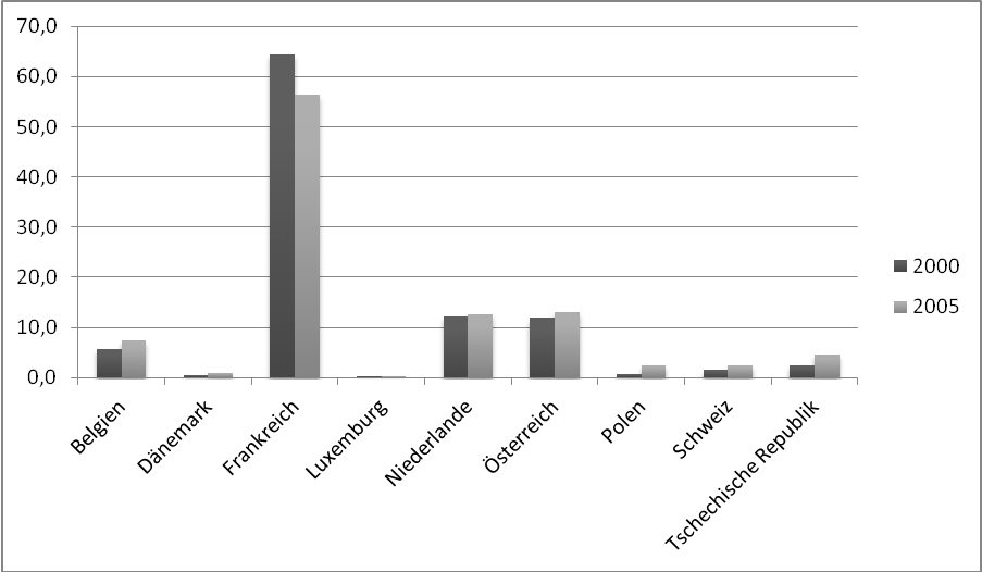 Grenzpendler in Deutschland 2000 bis 2005 (Quelle: IAS(Hrbg.), S.2.)